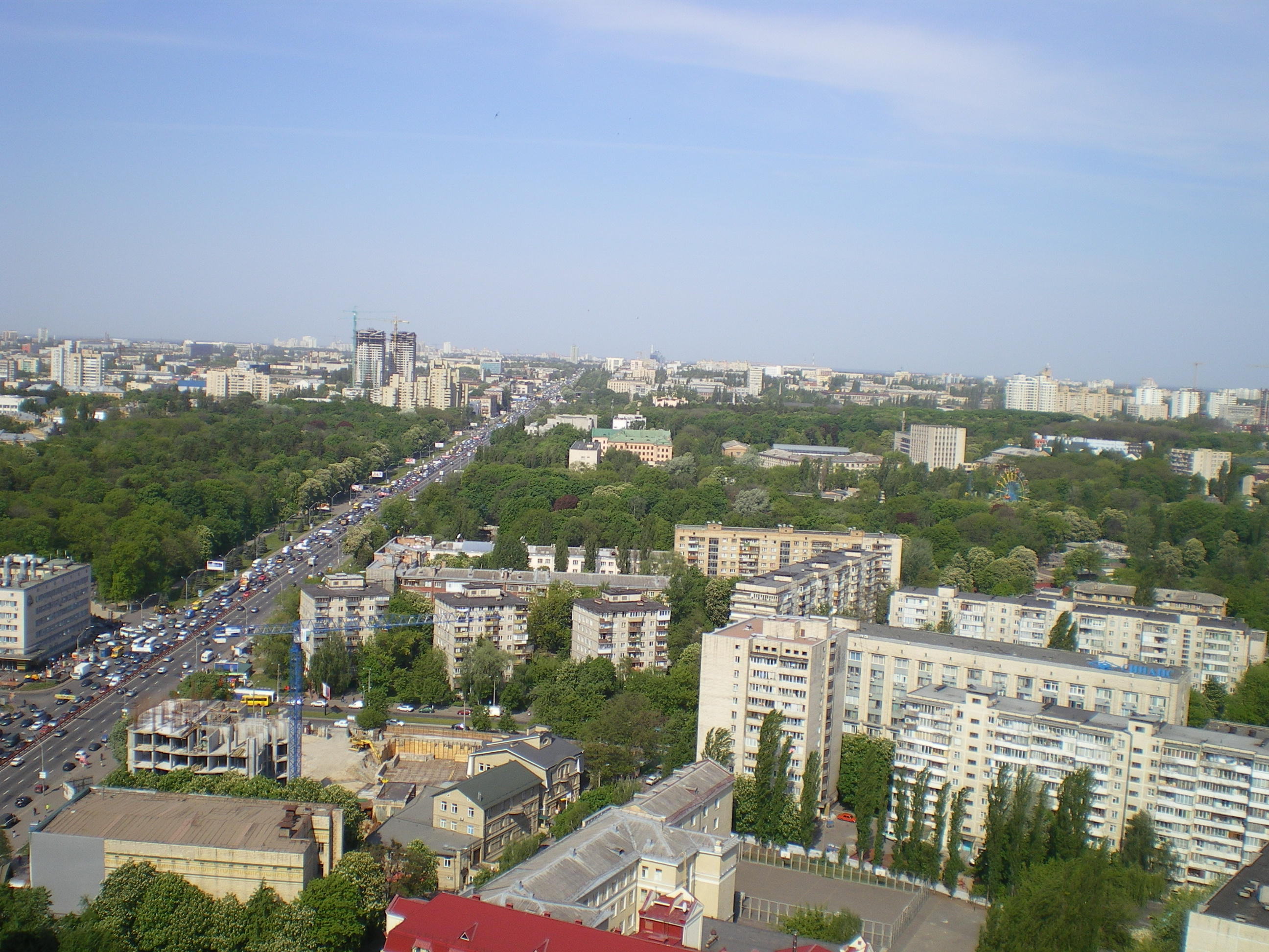 Вид на Проспект Победы, парк Политеха и Киевский зоопарк